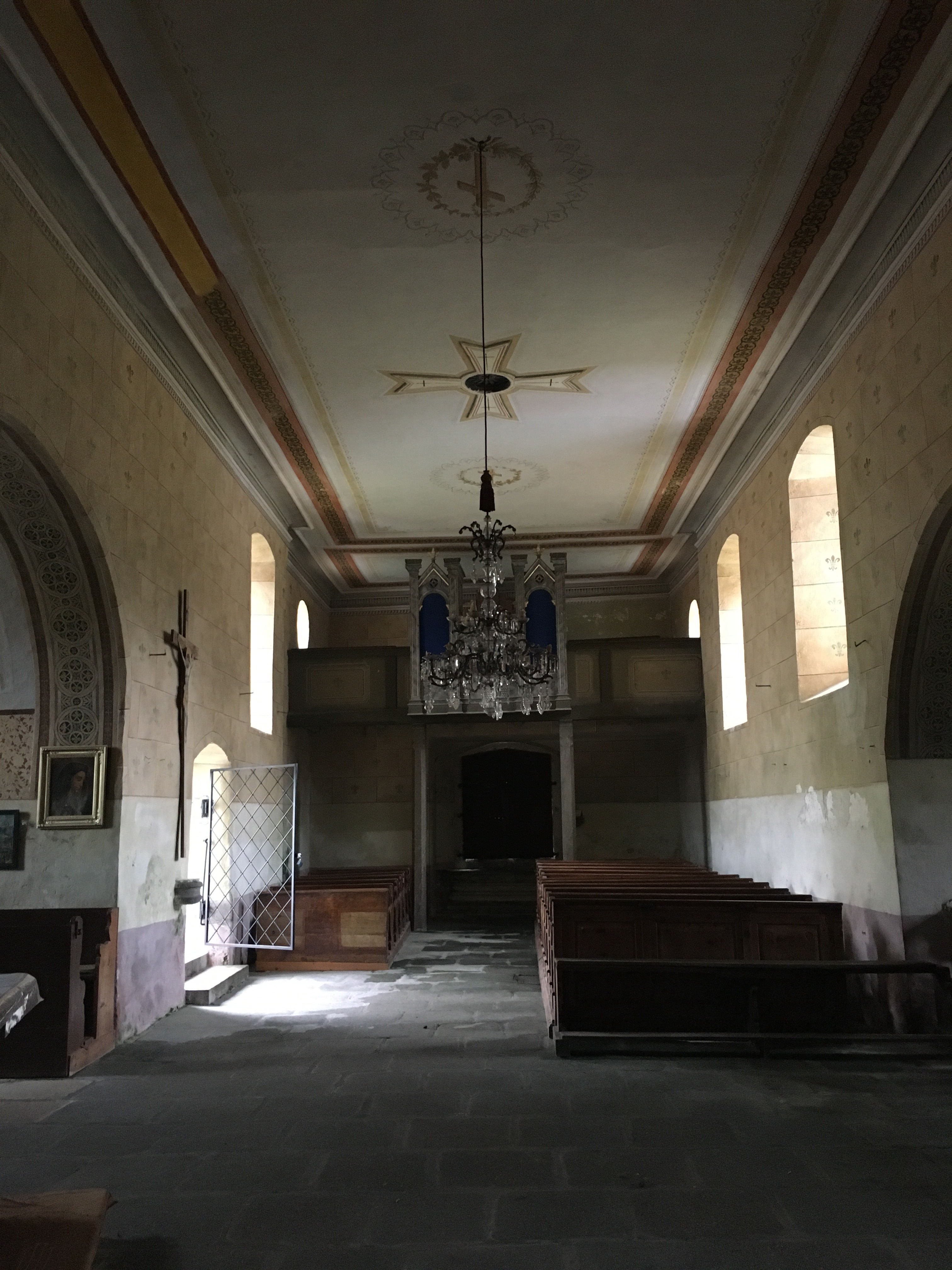 Kostel sv. Jana Křtitele, Chřešťovice